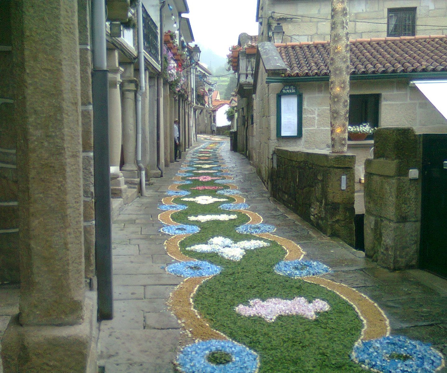 Mosaico floral en una de las calles de Combarro